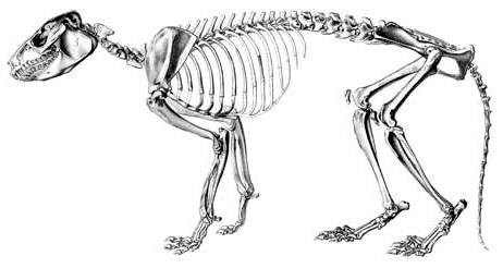 Reconstrucción artística del esqueleto de Protypotherium